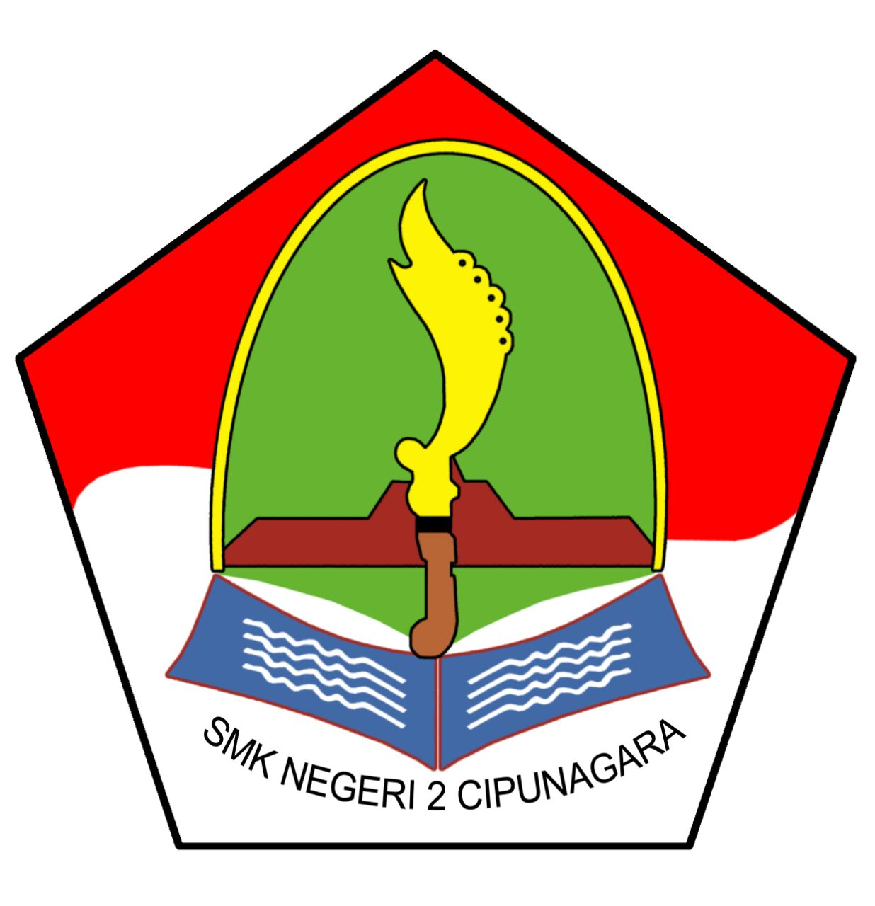 Logo SMKN 2 Cipunagara